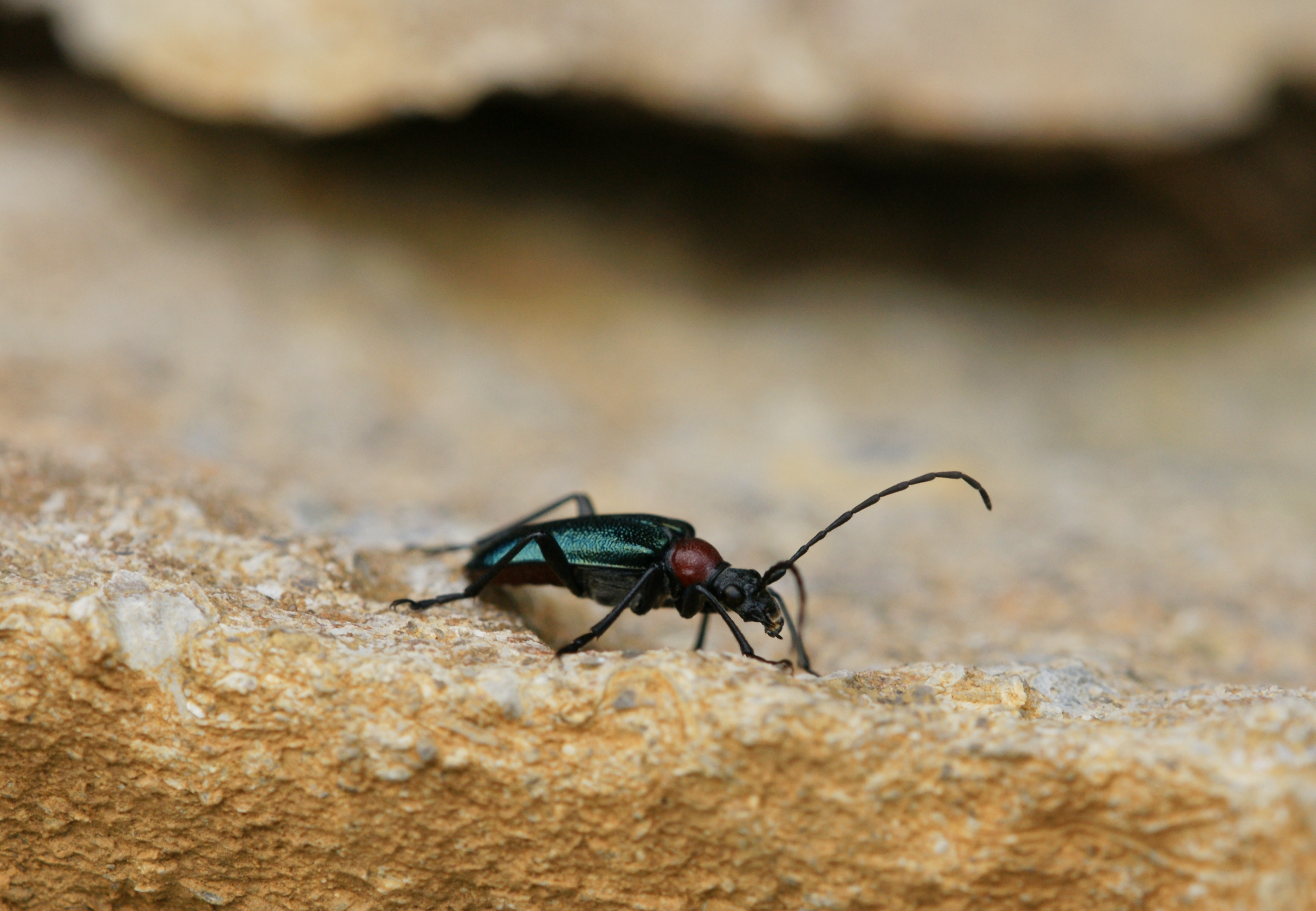 Gaurotes virginea, Vorarlberg, Austria